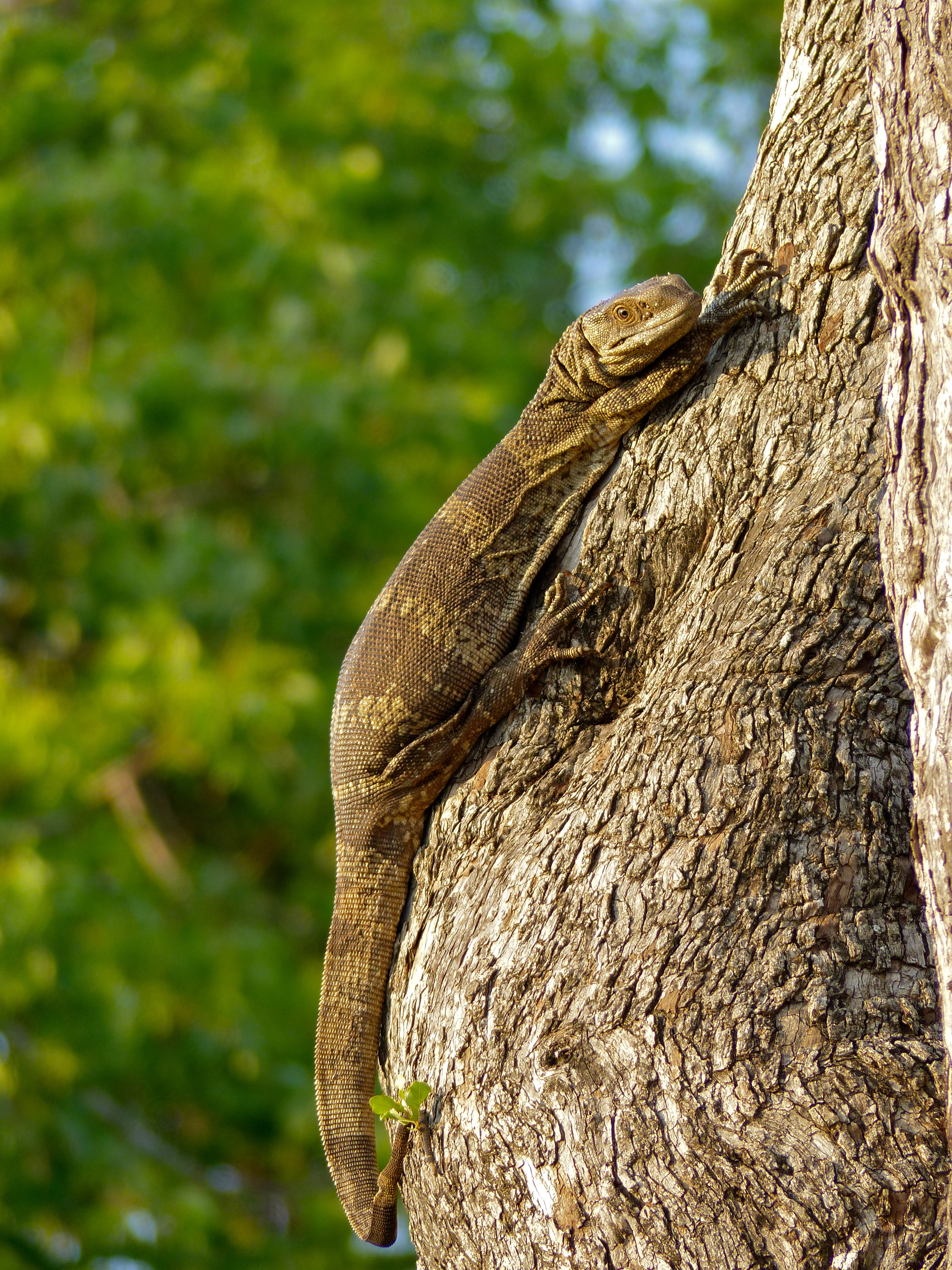 S25 (Crocodile) Road, Kruger NP, SOUTH AFRICA